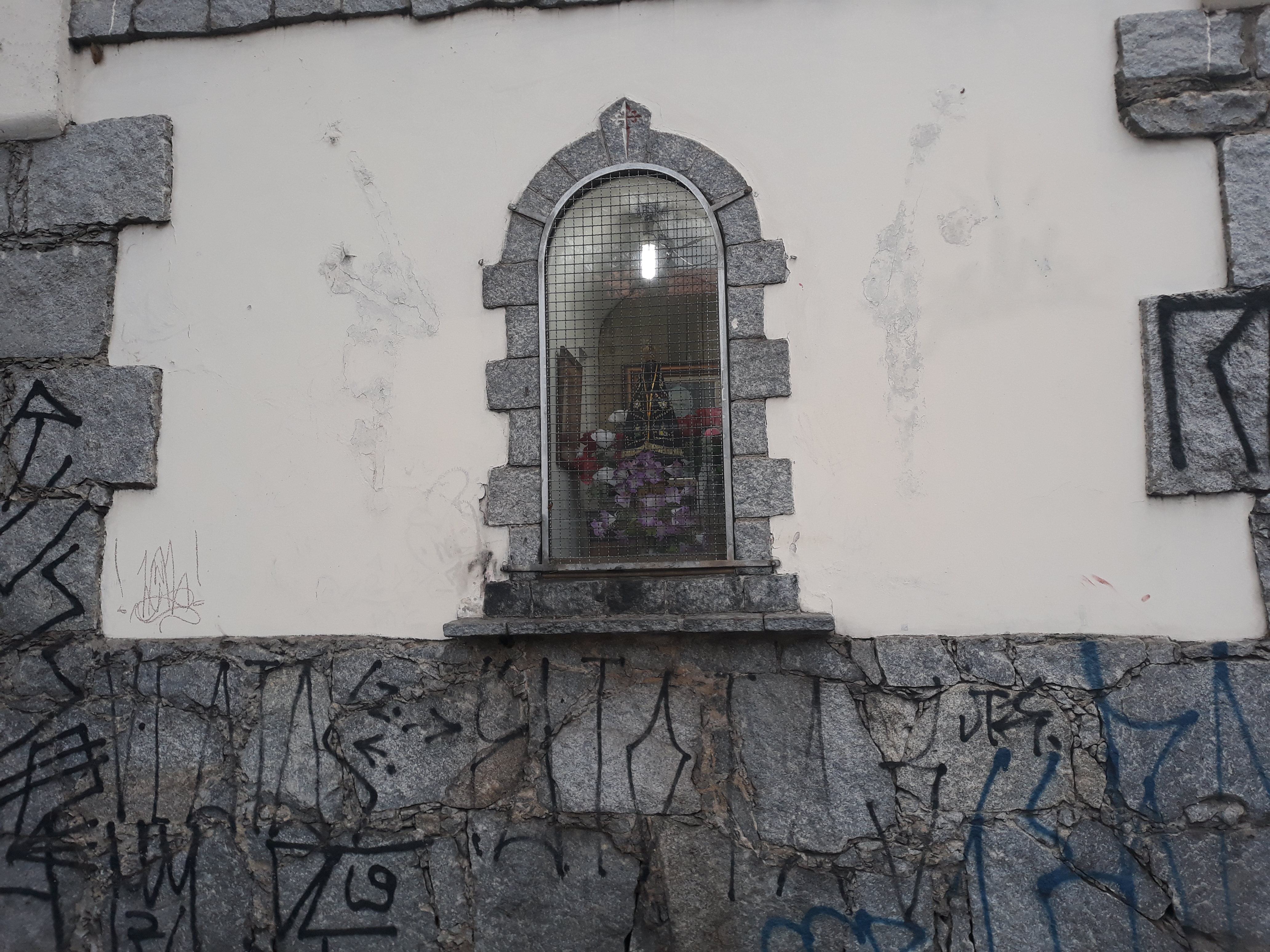 Português do Brasil: Fachada da parte esquerda do Casarão Sabbado D'angelo, com figura de Nossa Senhora Aparecida, Rua Sabbado D'Angelo, em São Paulo (SP), Brasil.